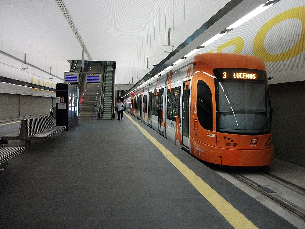 Estacion de Luceros (FGV)